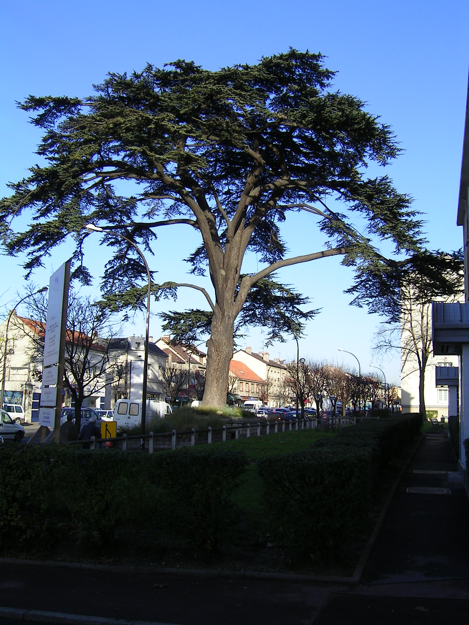 Livry-Gargan (France) - Le cèdre du Liban - Novembre 2006 Photo personnelle (own work) de Marianna